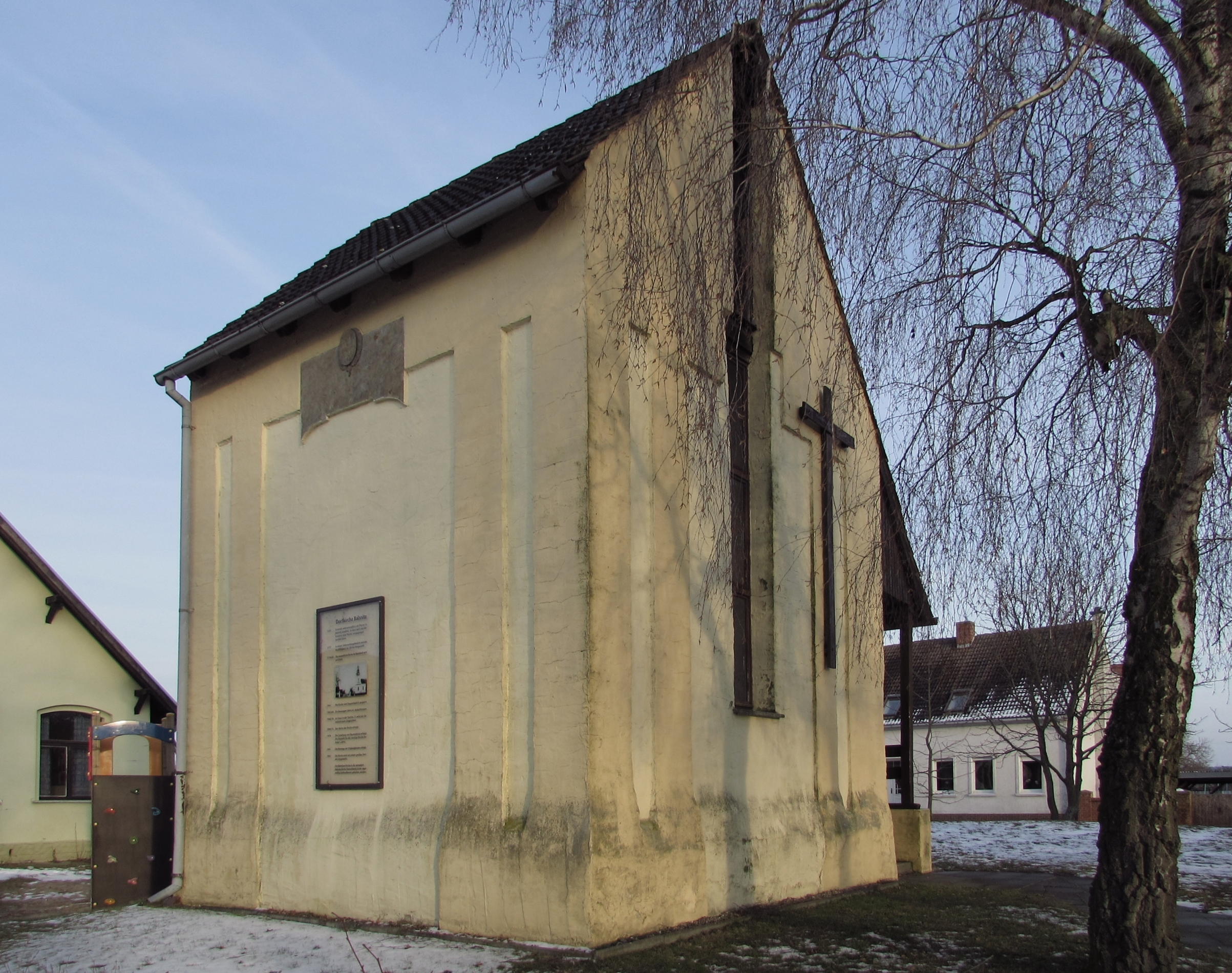 Dorfkirche Bahnitz